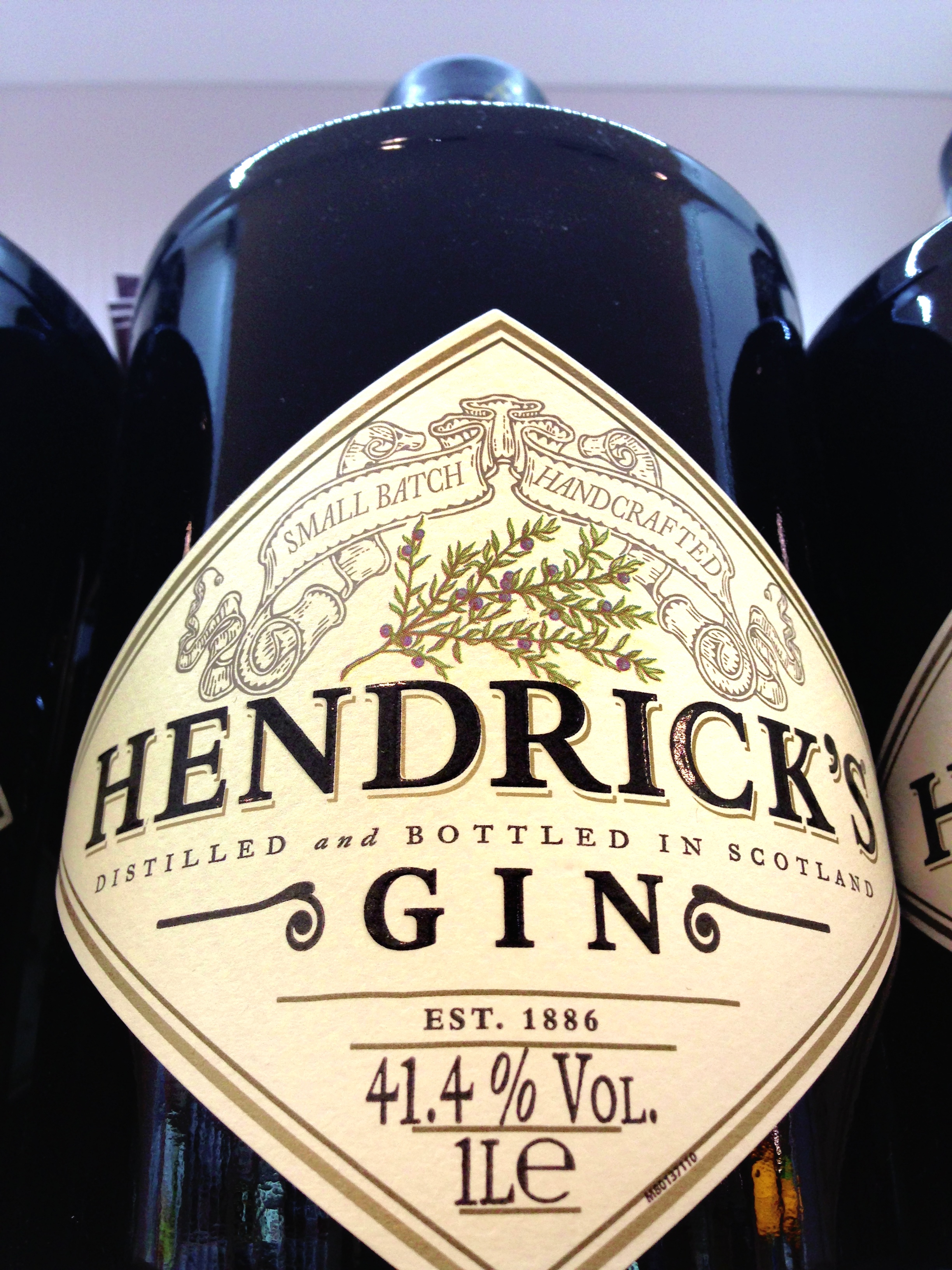 Hendrick's Gin Aug 2013